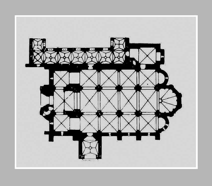 Zsámbék: templomrom alaprajza